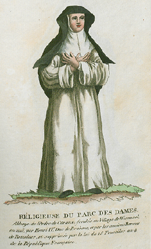 Collection de costumes de tous les ordres monastiques, supprimés à differentes époques, dans la ci-devant Belgique, Bruxelles, Philippe Joseph Maillart et sœur, 1811